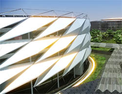 Usos Multiples CJM